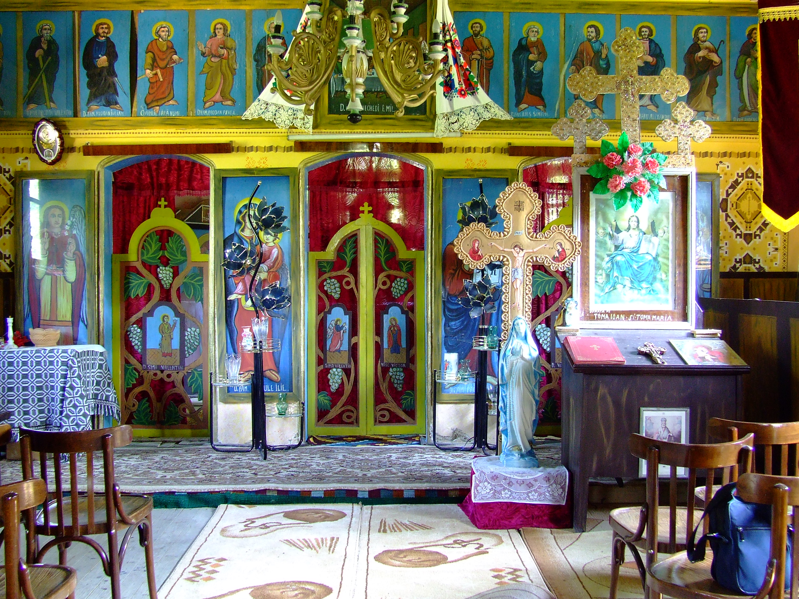 Biserica de lemn din Poiana Onţii, judeţul Sălaj. Uşile împărăteşti.